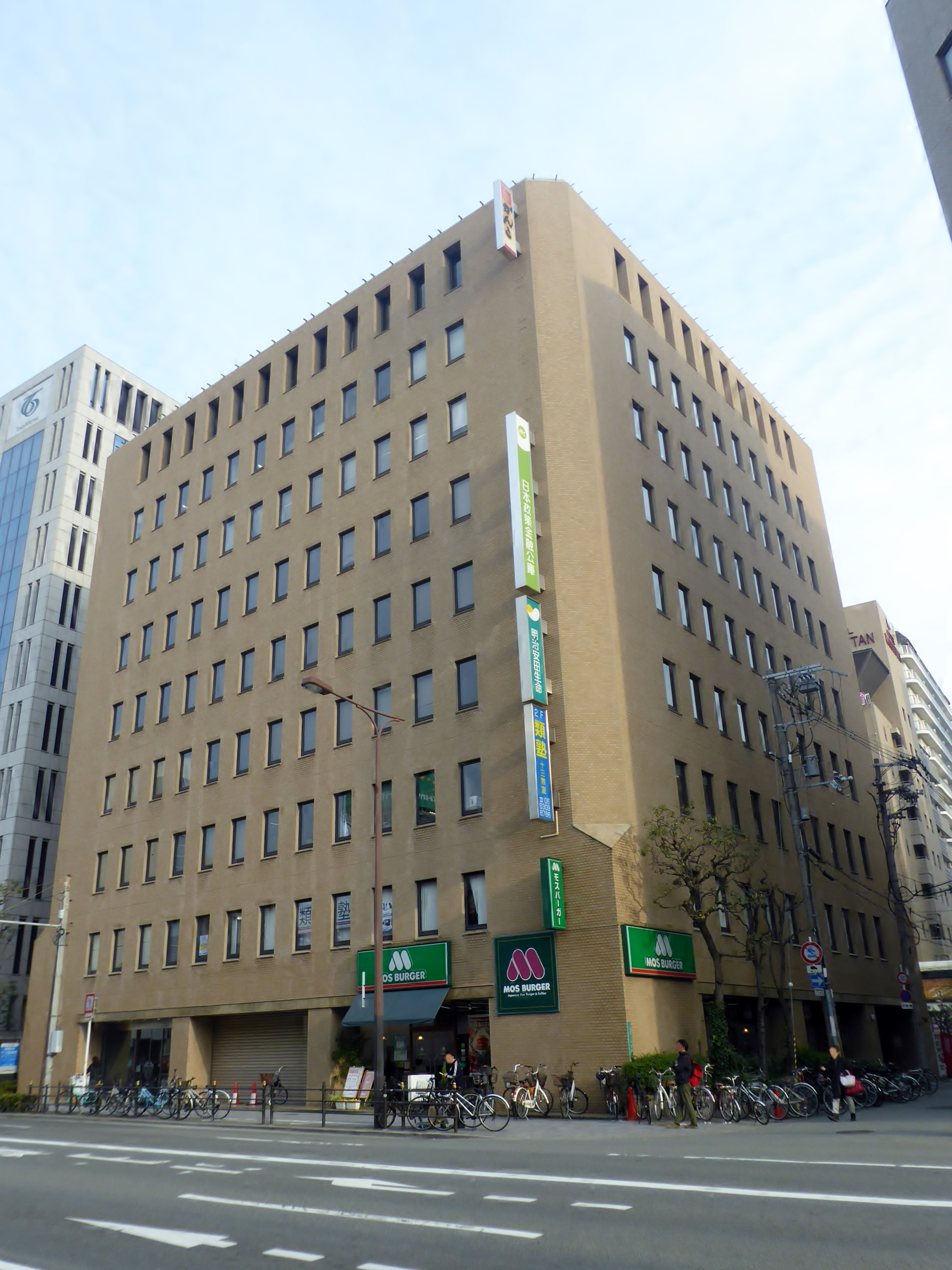 明治安田生命十三ビルを撮影。